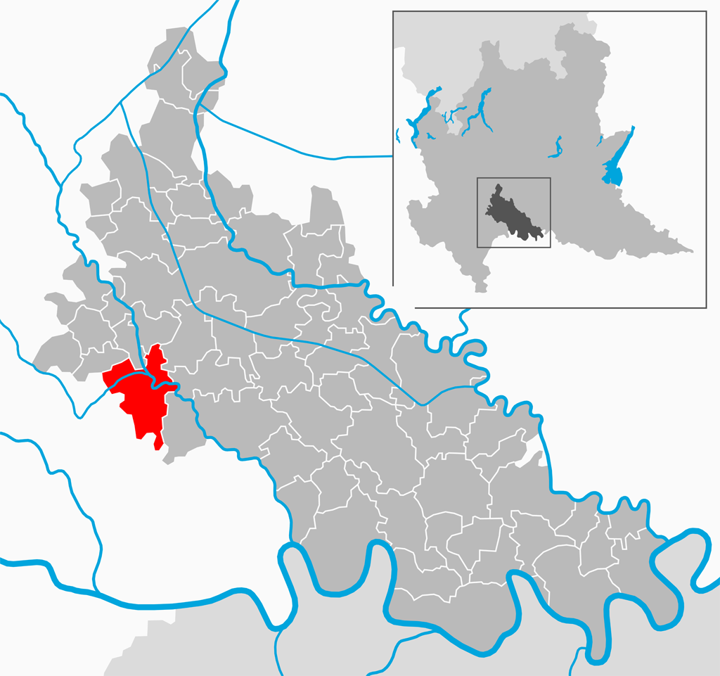 Il comune di Sant’Angelo Lodigiano nella provincia di Lodi